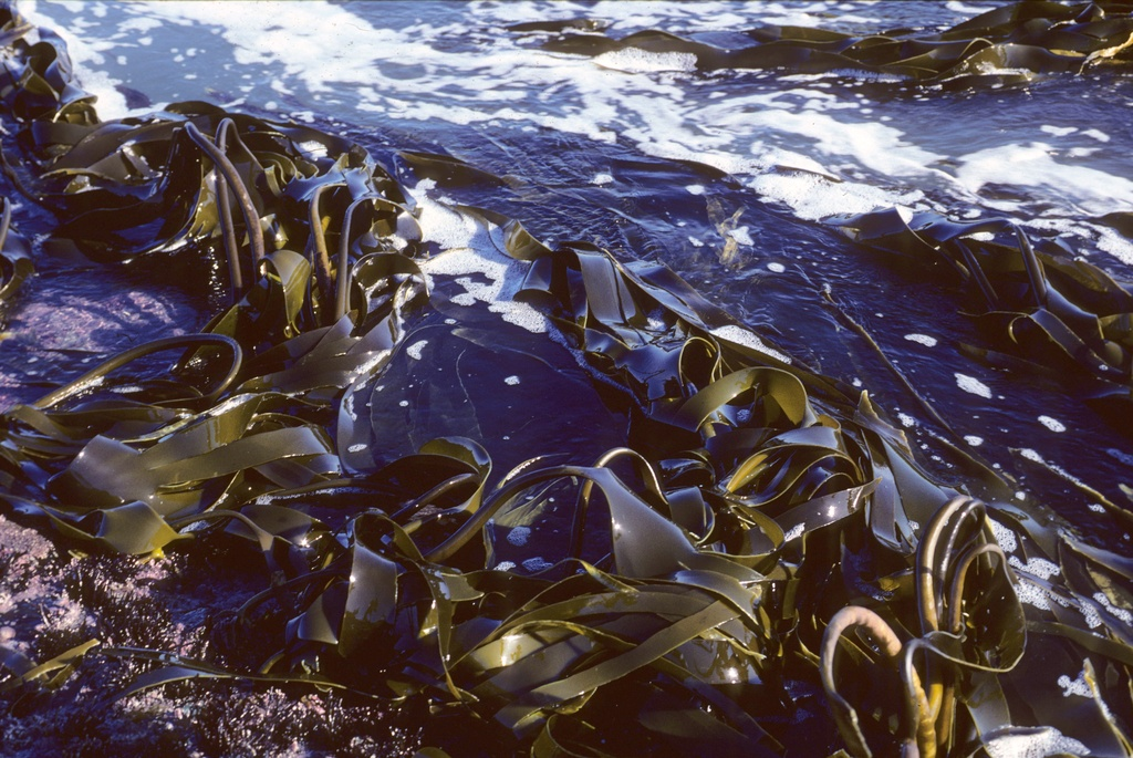 Laminaria pallida, Namibia